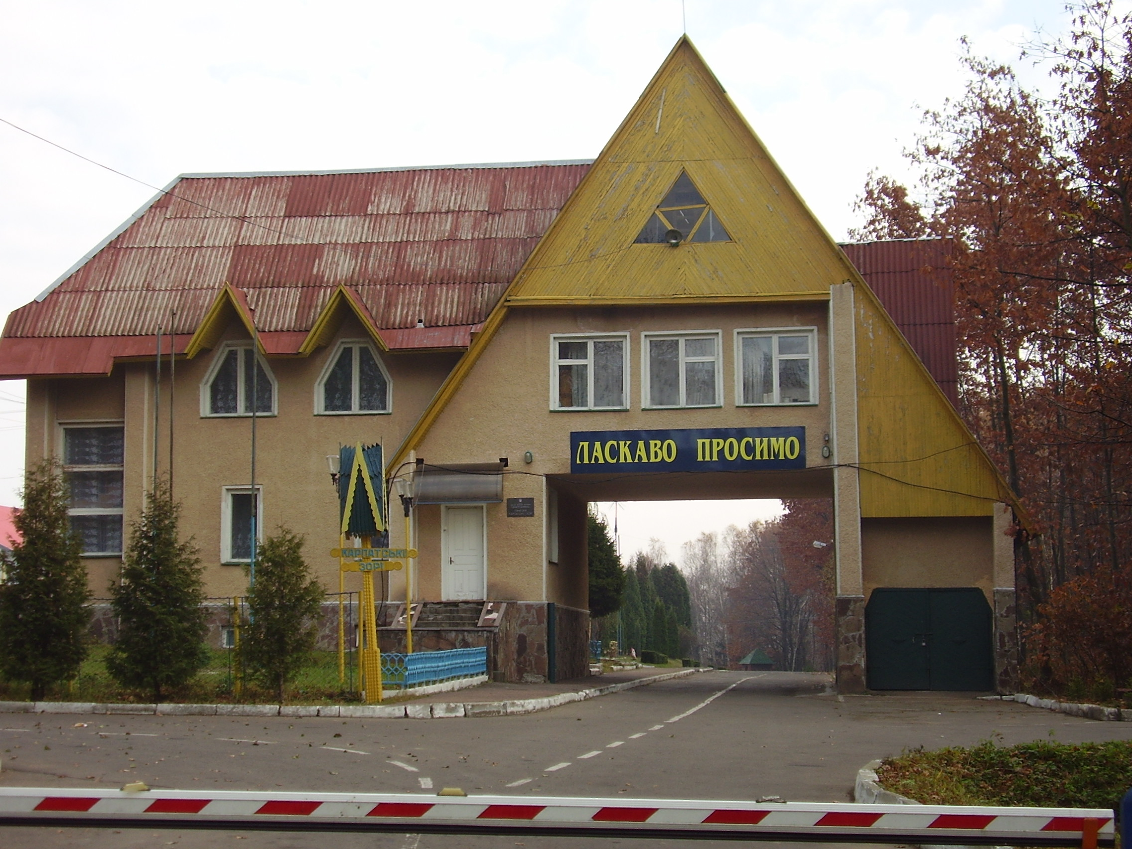 вхід до санаторію «Карпатські зорі»